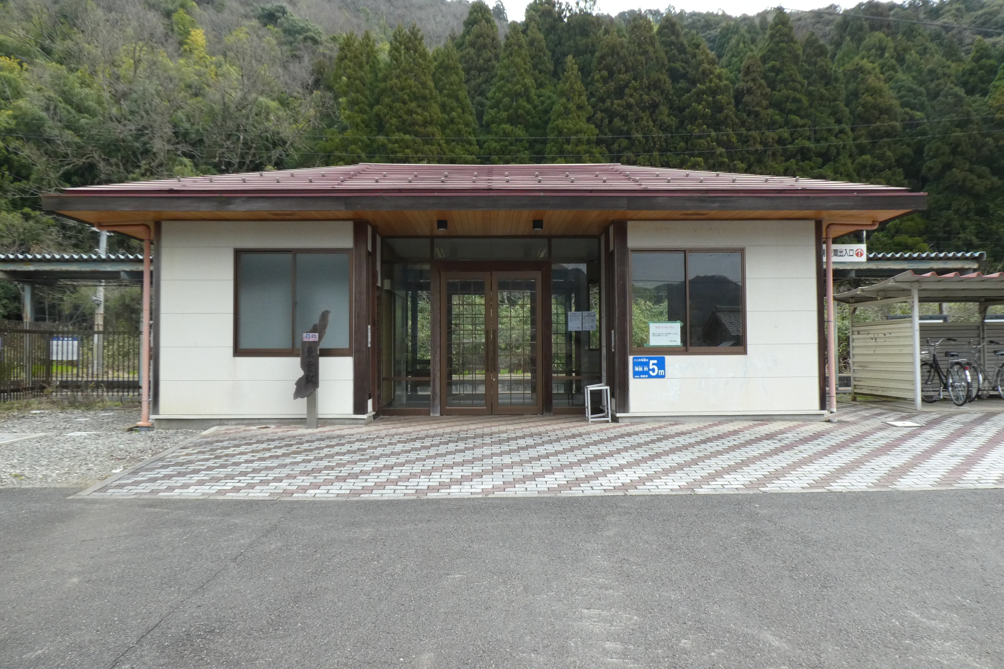 京都丹後鉄道 東雲駅 駅舎。